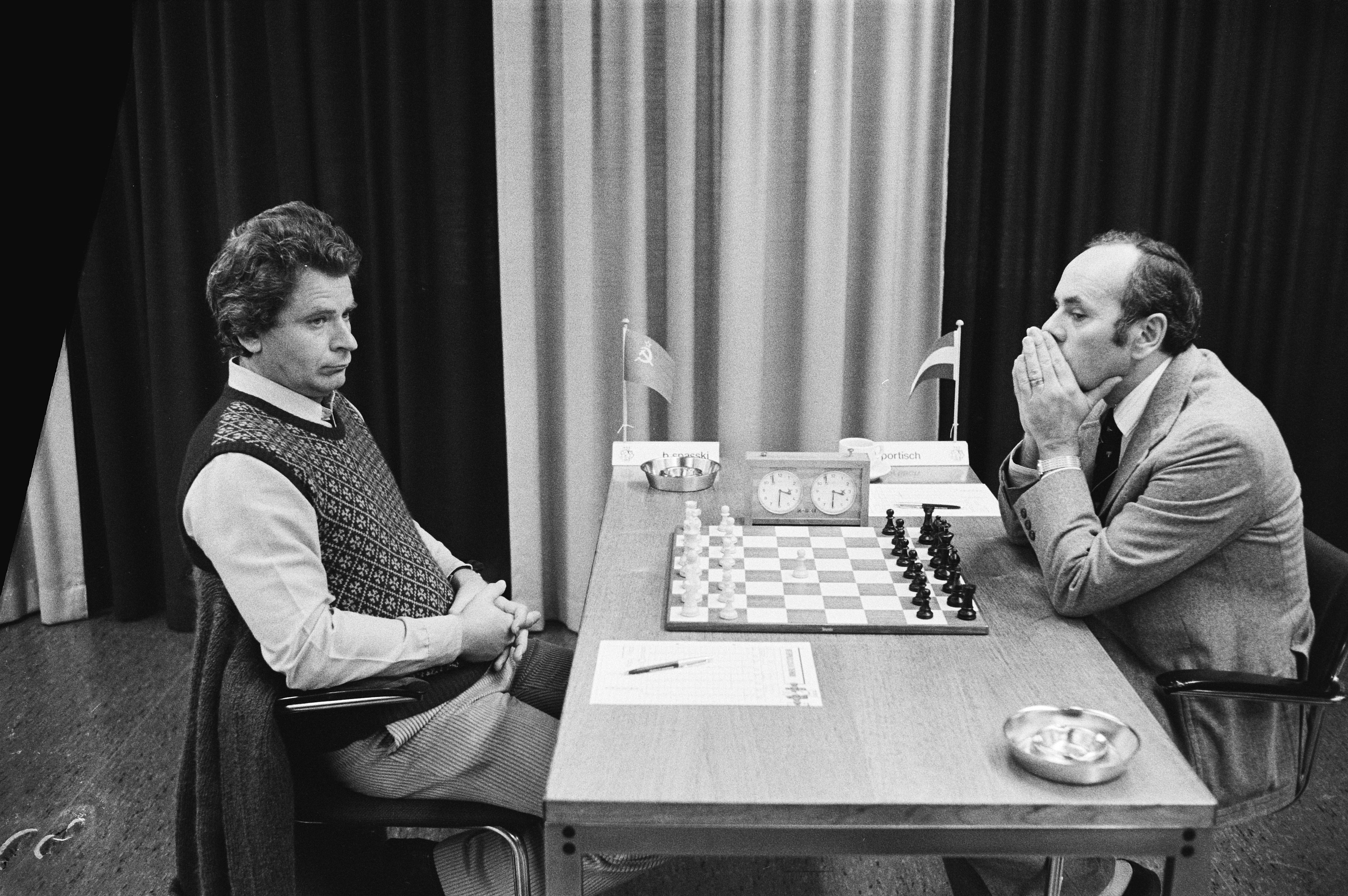 Collectie / Archief : Fotocollectie Anefo Reportage / Serie : Interpolis schaaktournooi 1979 in Tilburg Beschrijving : 1e Ronde, Boris Spasky (l) en Lajos Portisch aan het begin van hun partij Annotatie : Randnummers negatiefstrook: no 24+ 25: Spasky en Portisch; no. 26+27: Sosonko + Karpov Datum : 2 november 1979 Locatie : Noord-Brabant, Tilburg Trefwoorden : schaken, toernooien Persoonsnaam : Portisch, Lajos, Spassky, Boris Fotograaf : Suyk, Koen / Anefo Auteursrechthebbende : Nationaal Archief Materiaalsoort : Negatief (zwart/wit) Nummer archiefinventaris : bekijk toegang 2.24.01.05 Bestanddeelnummer : 930-5228